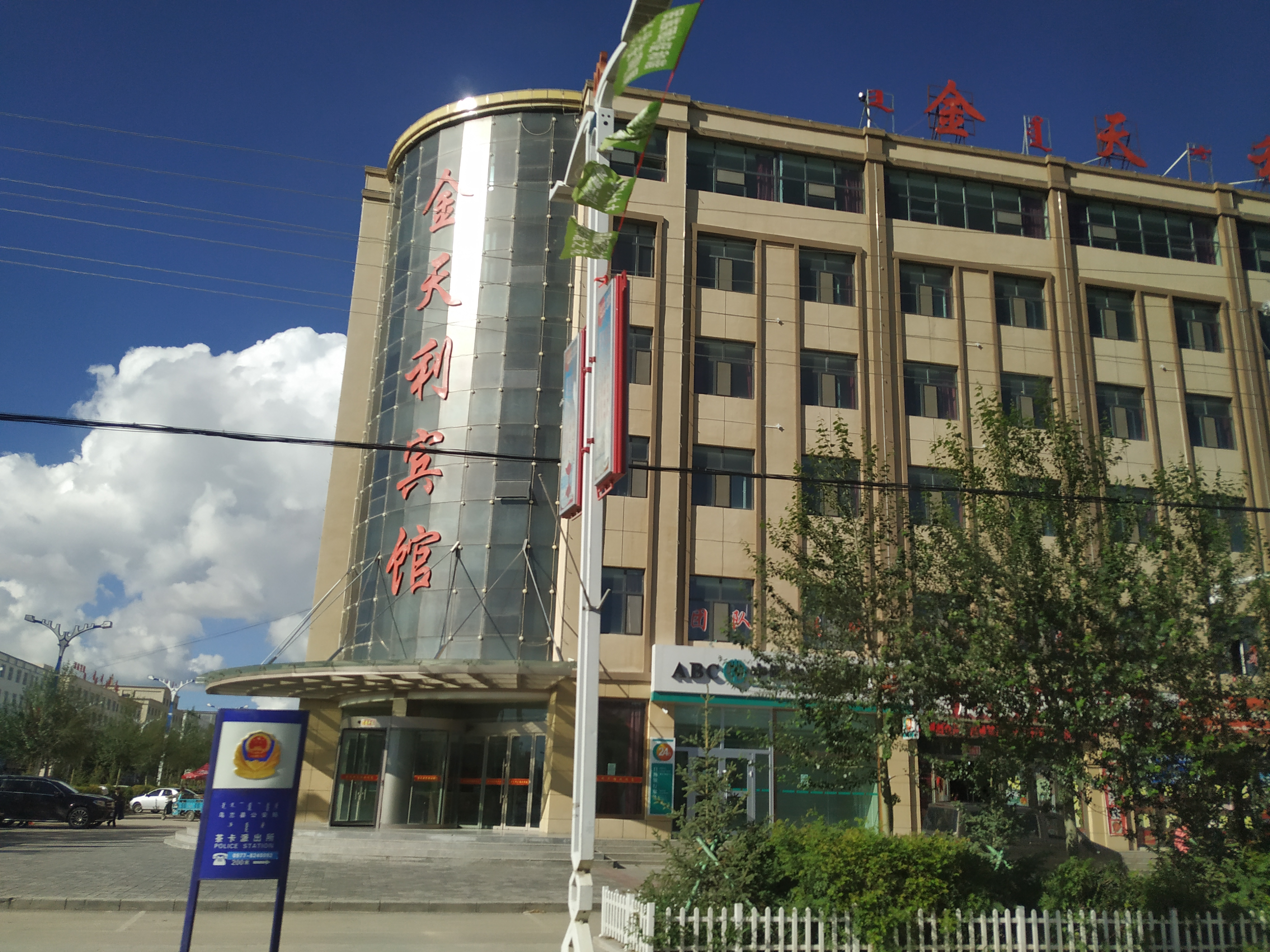 中文（中国大陆）: 海西乌兰县茶卡镇